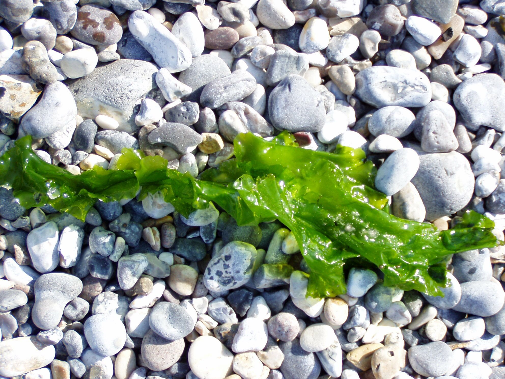 Alge auf Düne bei Helgoland